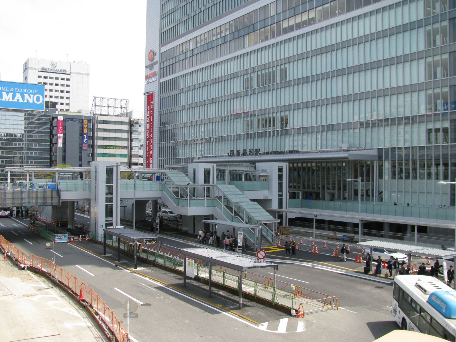 JR新横浜駅